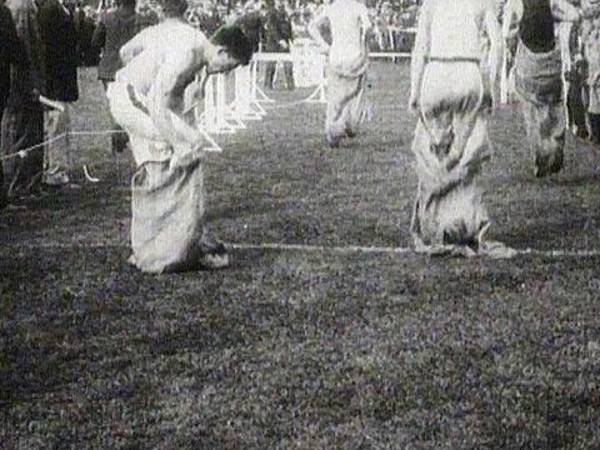 sack race , st . louis 1904